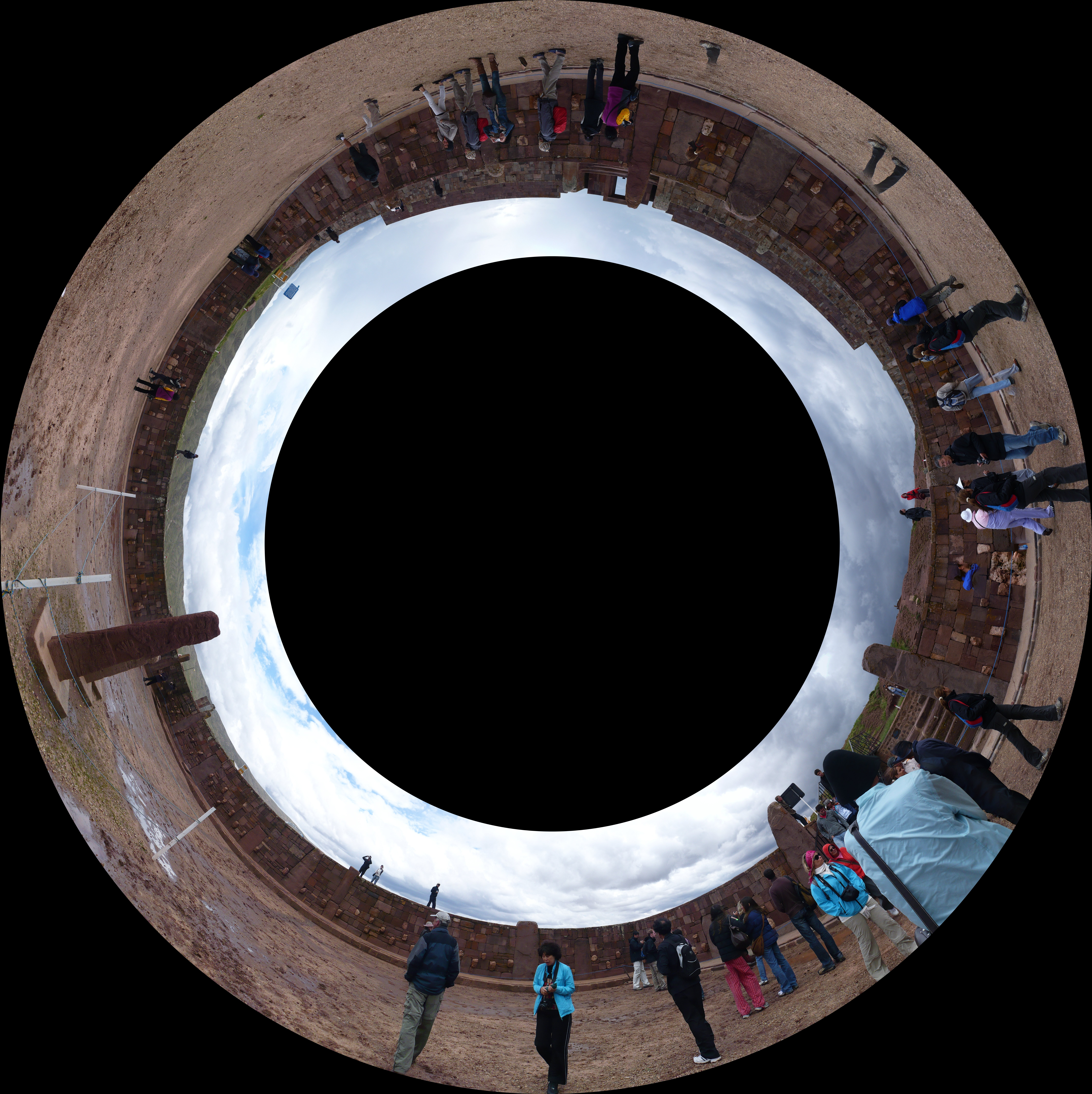 vista a 360º del templete semi subterráneo de Tiwanaku generada a partir de 14 fotografías individuales